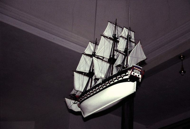 Damsholte Kirke Møn Kommune, Denmark; Votivskib